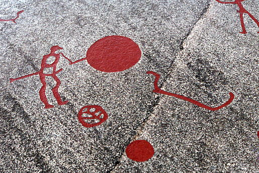 Gravure préhistorique de Tanum, Suède